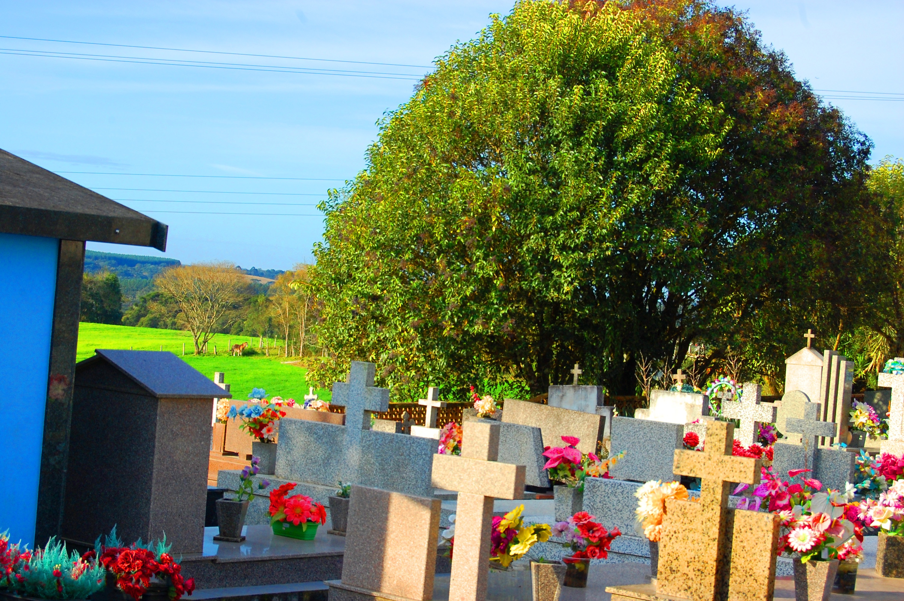 Cemitério da Igreja São Pedro e São Paulo em Moema, Itaiópolis, Santa Catarina, Brasil.